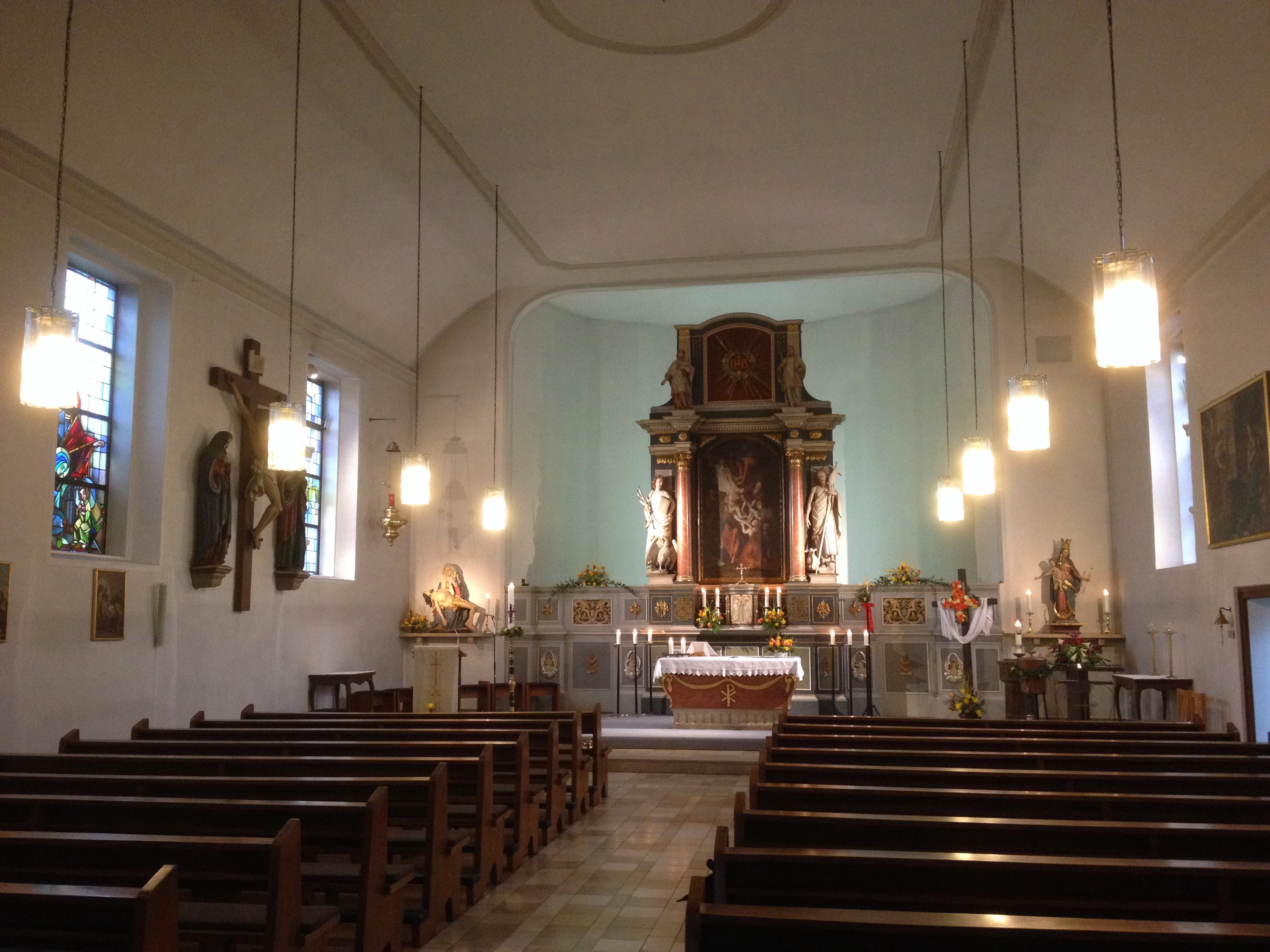 Vienenburg, kath. Kirche Heilige Familie